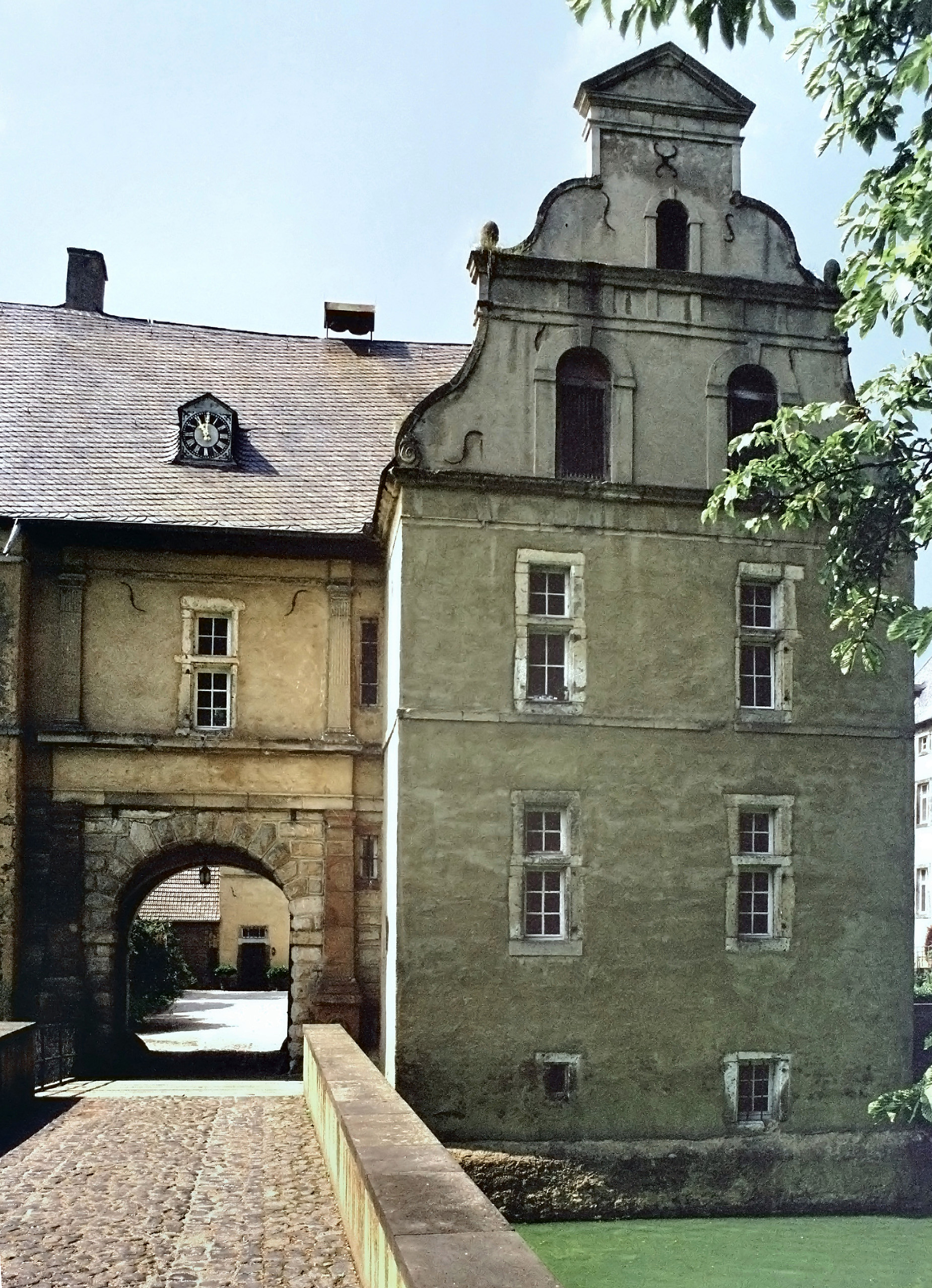 Das Torhaus von Burg Adendorf in Wachtberg-Adendorf